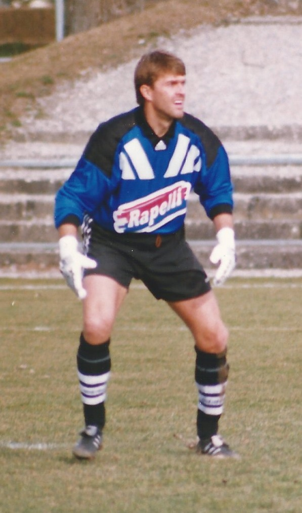 Le footballeur suisse Martin Brunner.